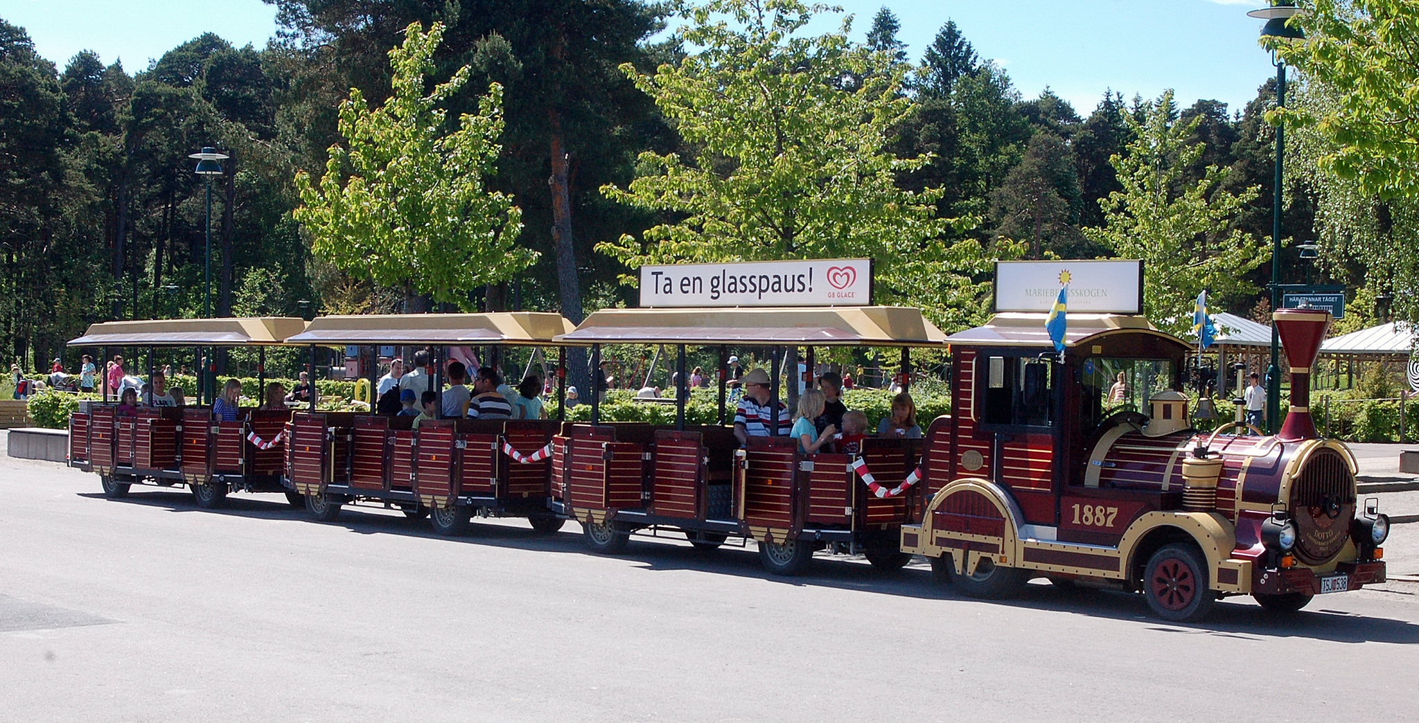 Mariebergståget Karlstad, Sweden